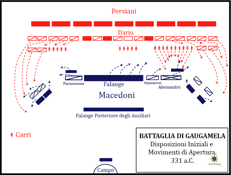 Disposizioni iniziali e movimenti di apertura durante la battaglia di Gaugamela del 331 a.C.